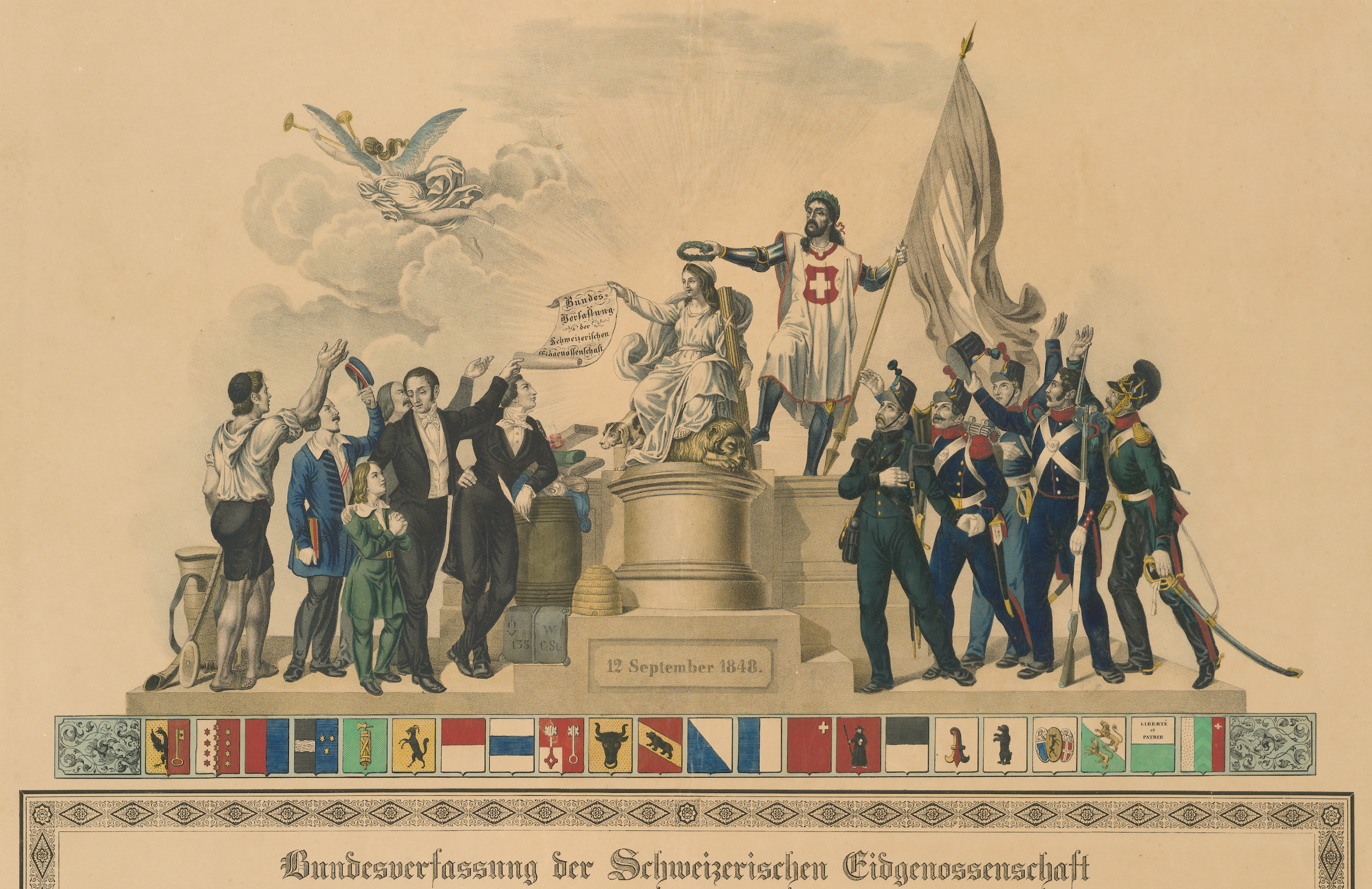 Bundesverfassung der Eidgenossenschaft vom 12. September 1848, mit allegorischer Figurengruppe. Ausschnitt ohne Text der Bundesverfassung unten.